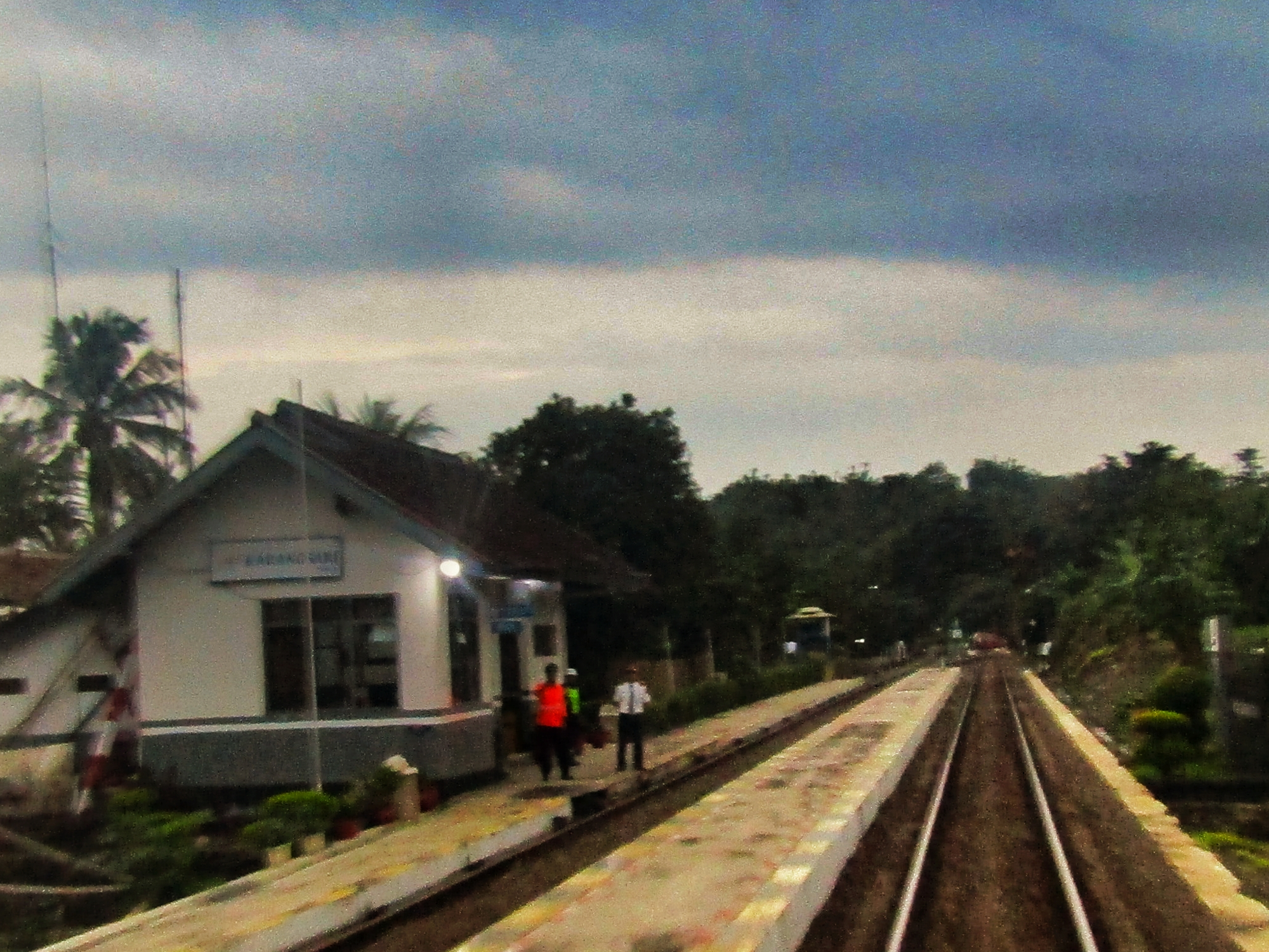 Bangunan Stasiun Karangsari Garut 2020